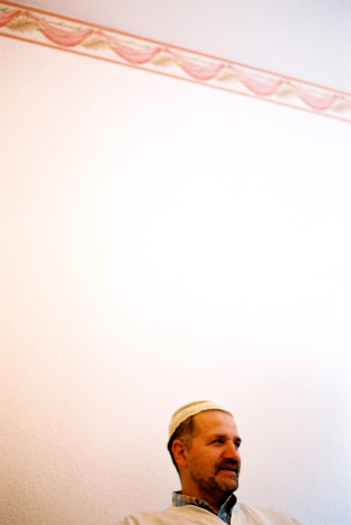 Georges Federmann, chez Mahmoud, Avril 2005. (photographié par son fils David Federmann)